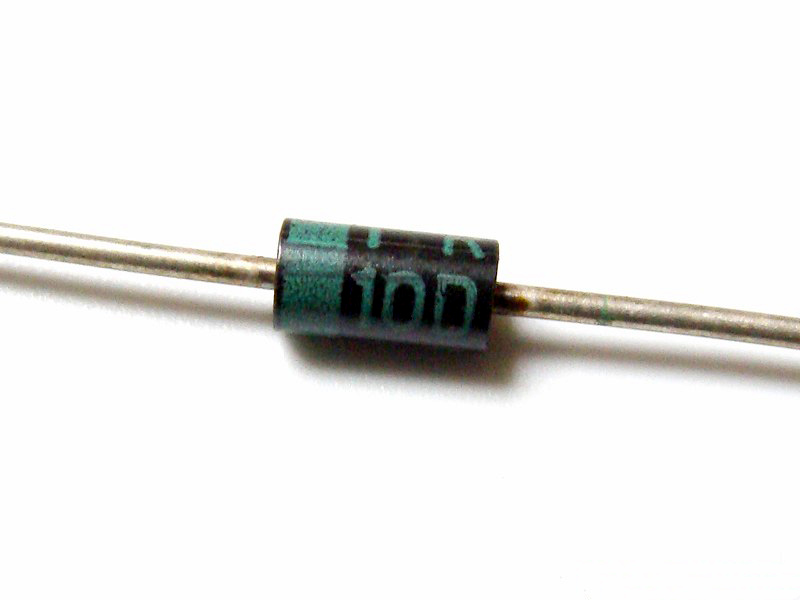 Diode IR 10D 9F